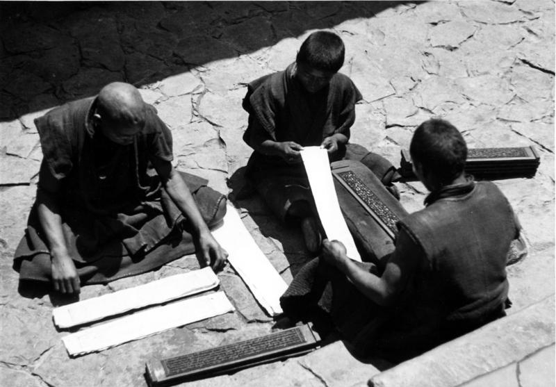 Taschilumpo [Tashilhunpo], Lamas beim Drucken von Büchern